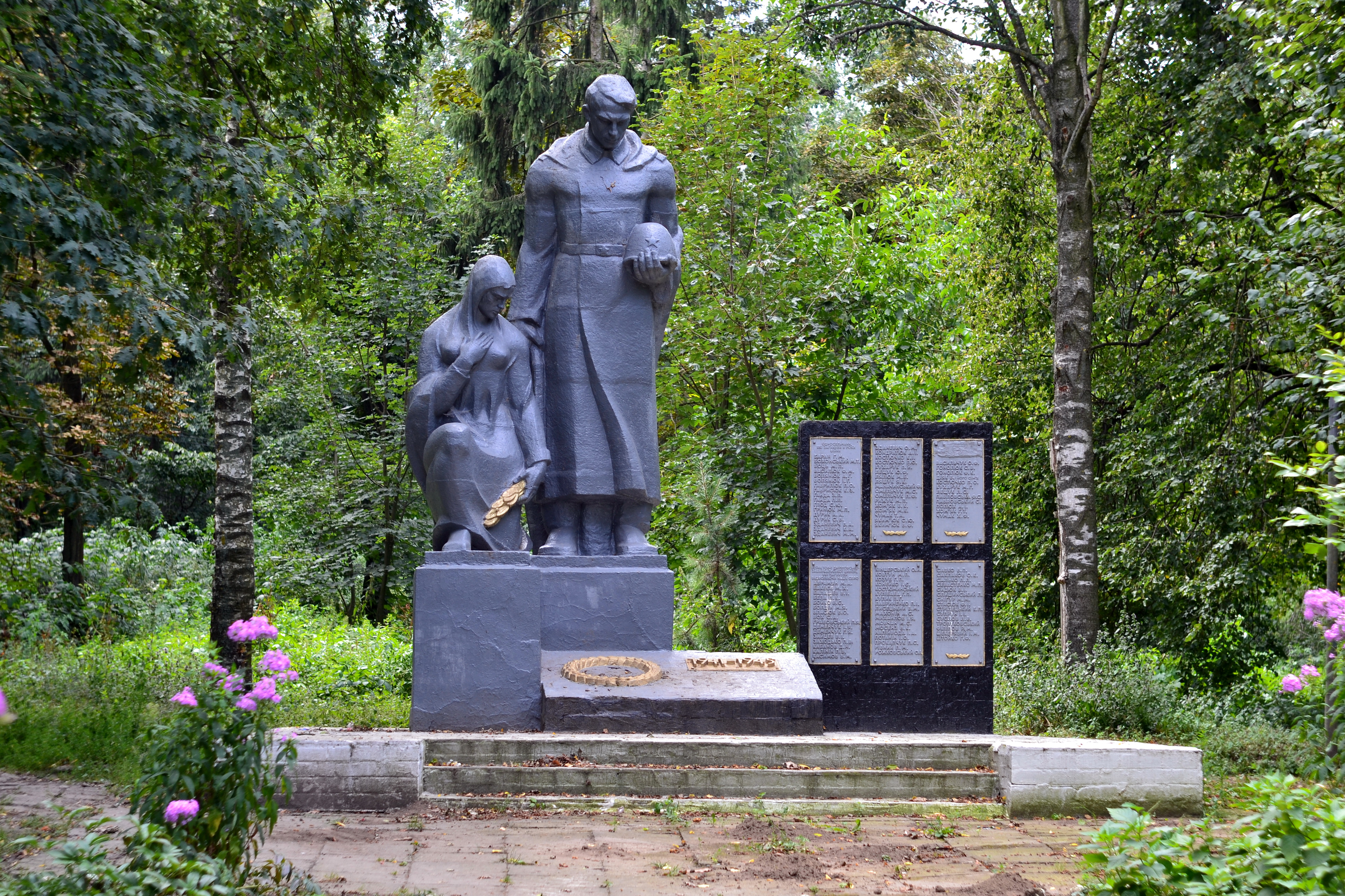 Пам'ятник землякам (1972 рік) - загальний вигляд - Старий Загорів Локачинський район Волинська область Україна